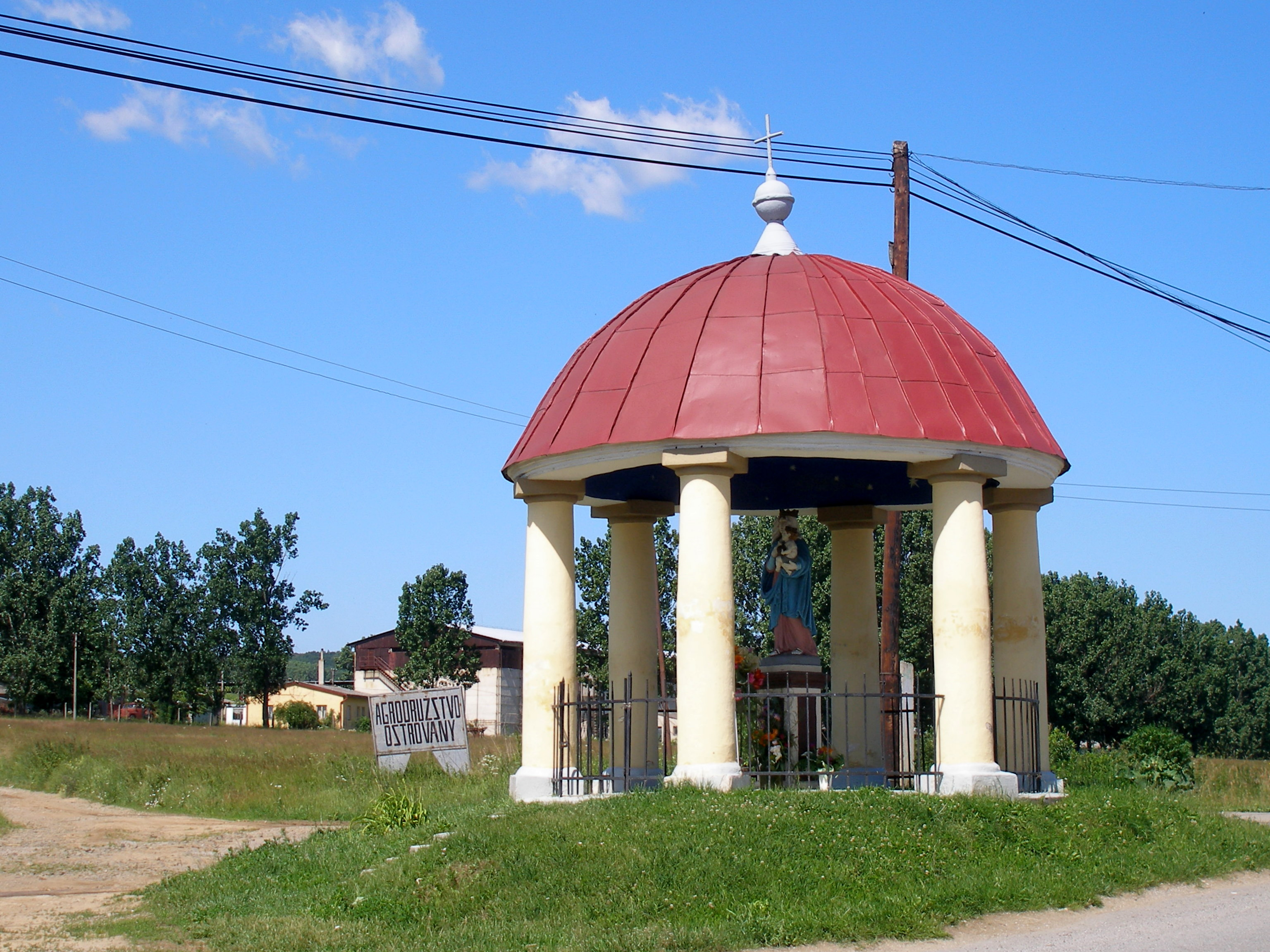 Obec Ostrovany okres Sabinov